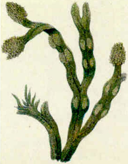 August und September: Gemeiner Blasentang Fucus vesiculosus L.